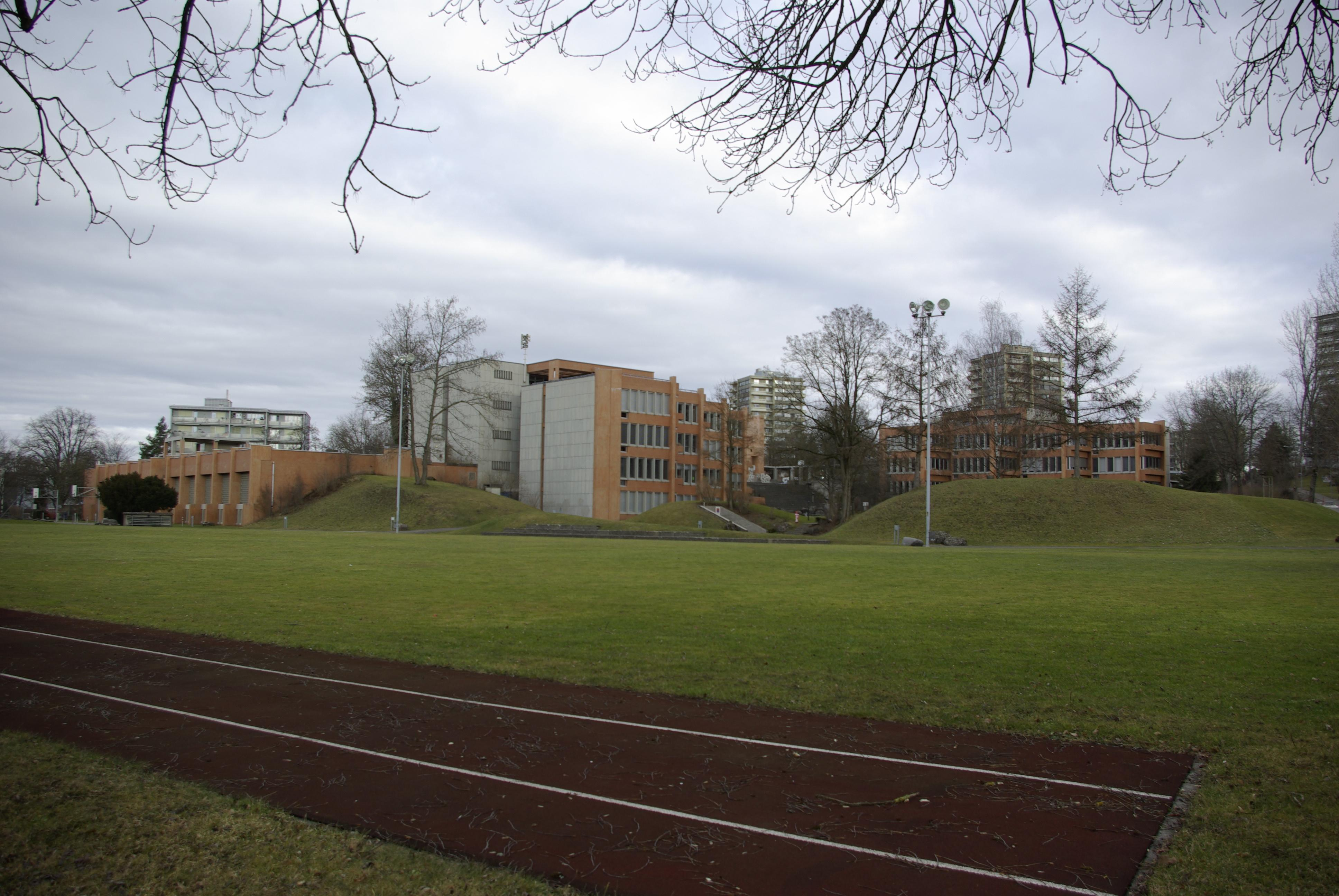 Sekundarschulhaus von Effretikon